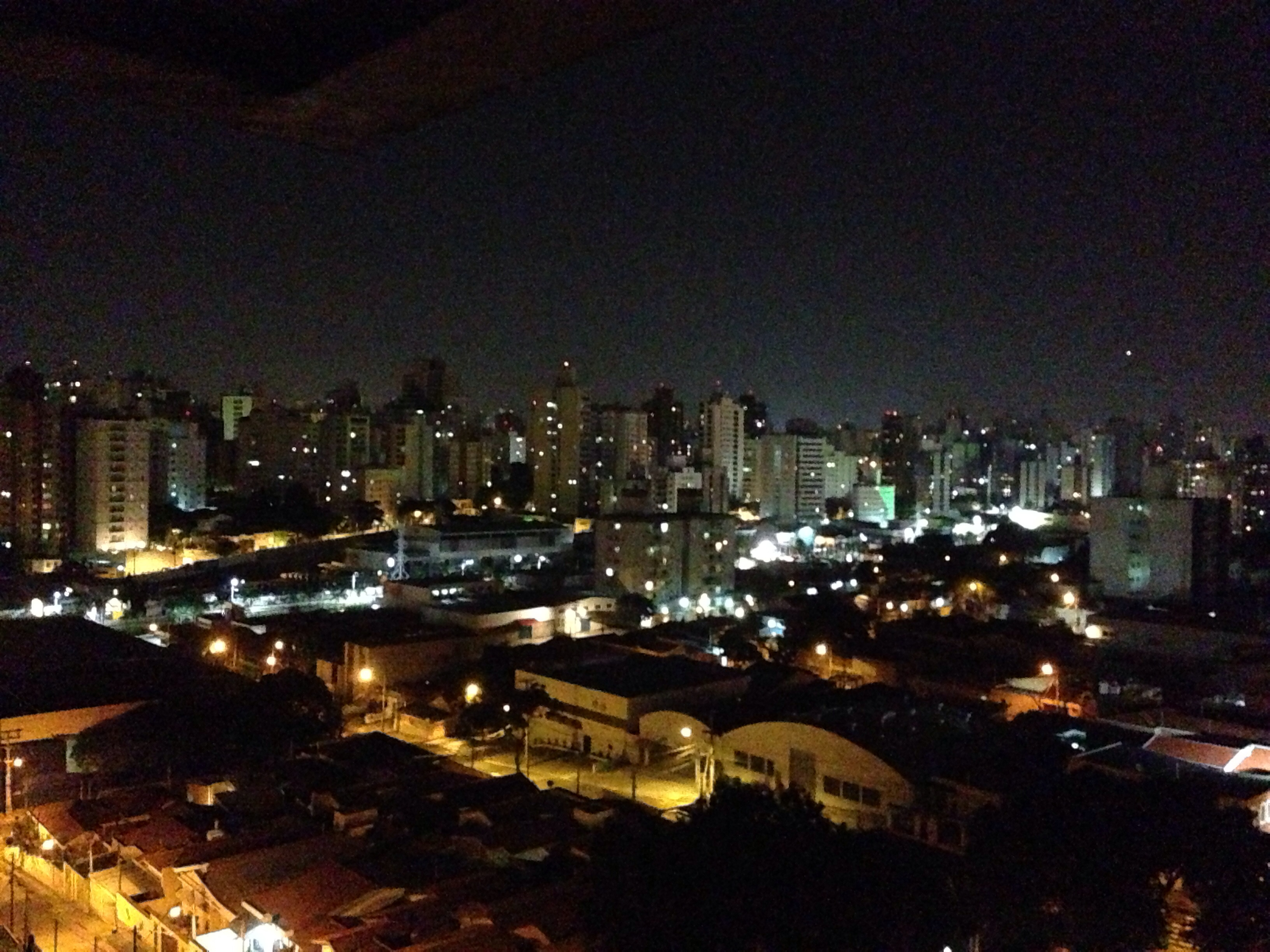 Vista da cidade city view